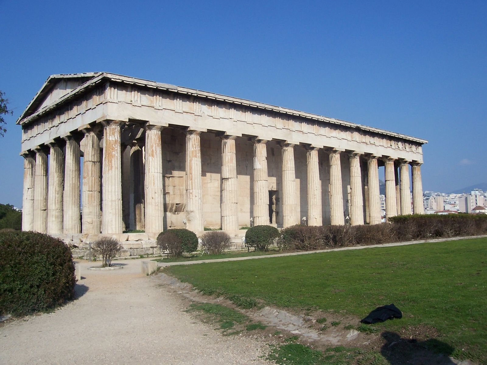 Agora, Atenas, Grecia